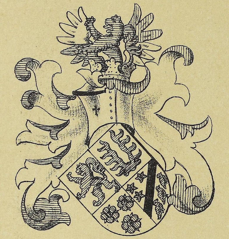 Wappen der Edlen von Dawans. Am 7. Juli 1792 wurde der Dawans durch Kurfürst Karl Theodor in den Ritter- und Adelsstand.